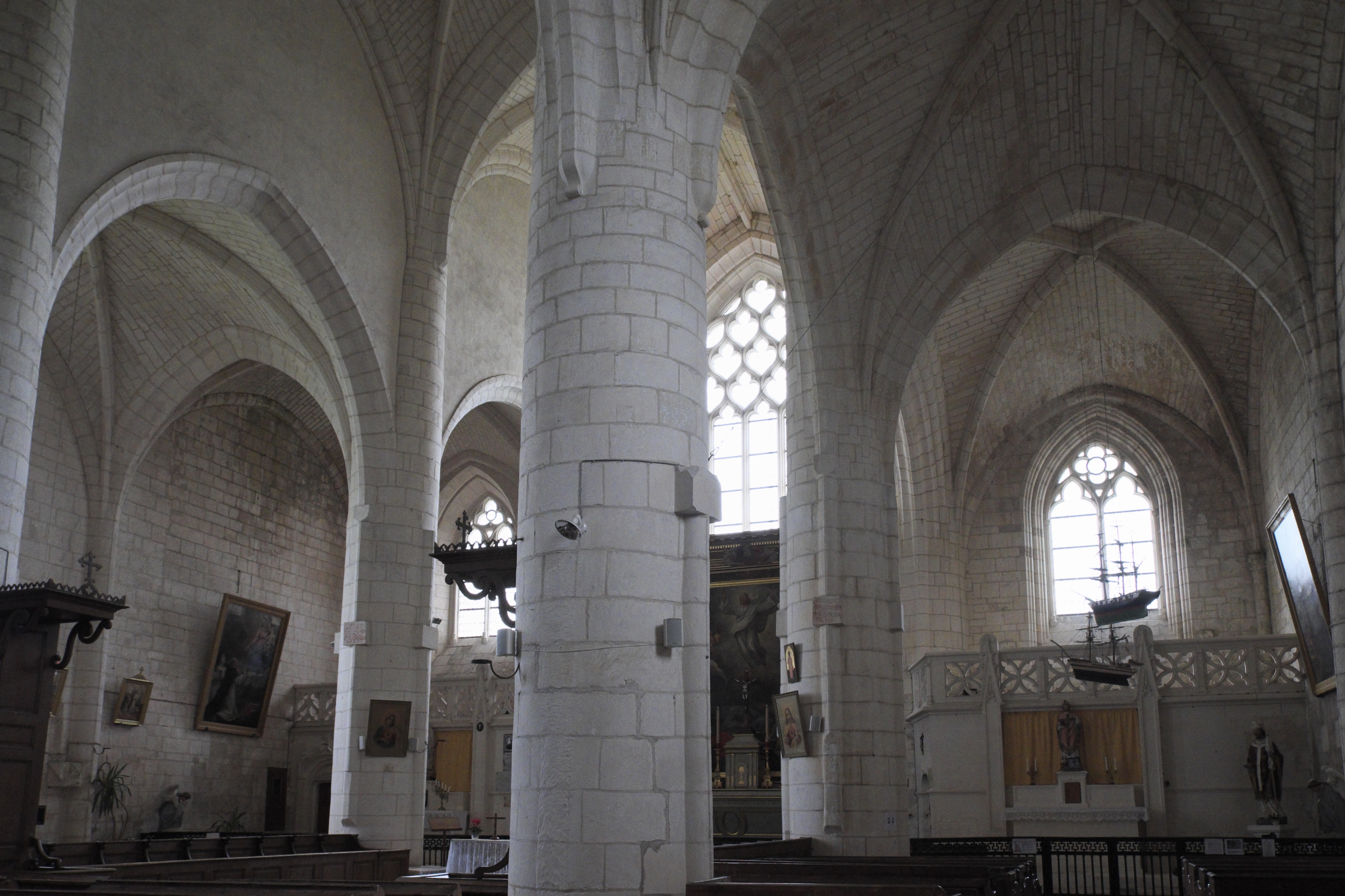 Katholische Kirche Saint-Martin in Esnandes im Département Charente-Maritime (Nouvelle-Aquitaine/Frankreich), Innenraum